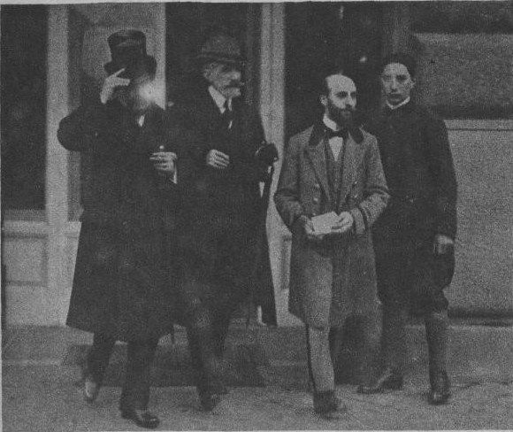 Aristide Briand et Camille Barrère à Rome entre le 6 et 8 janvier 1917 pour la Consulta ou réunion des Alliés à Rome.